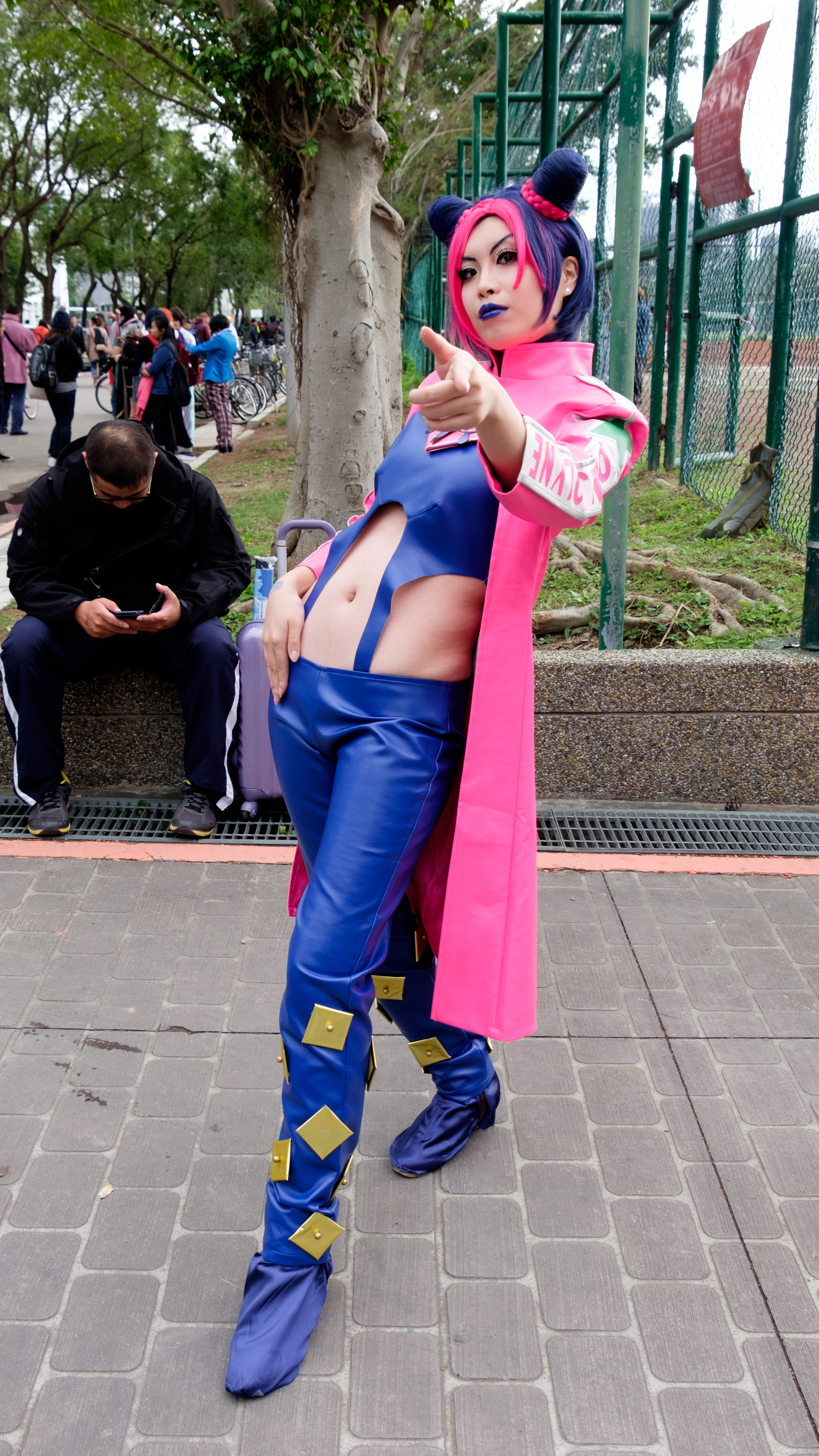 CWT41第一日下午，＜ジョジョの奇妙な冒険＞第6部空條徐倫cosplayer。